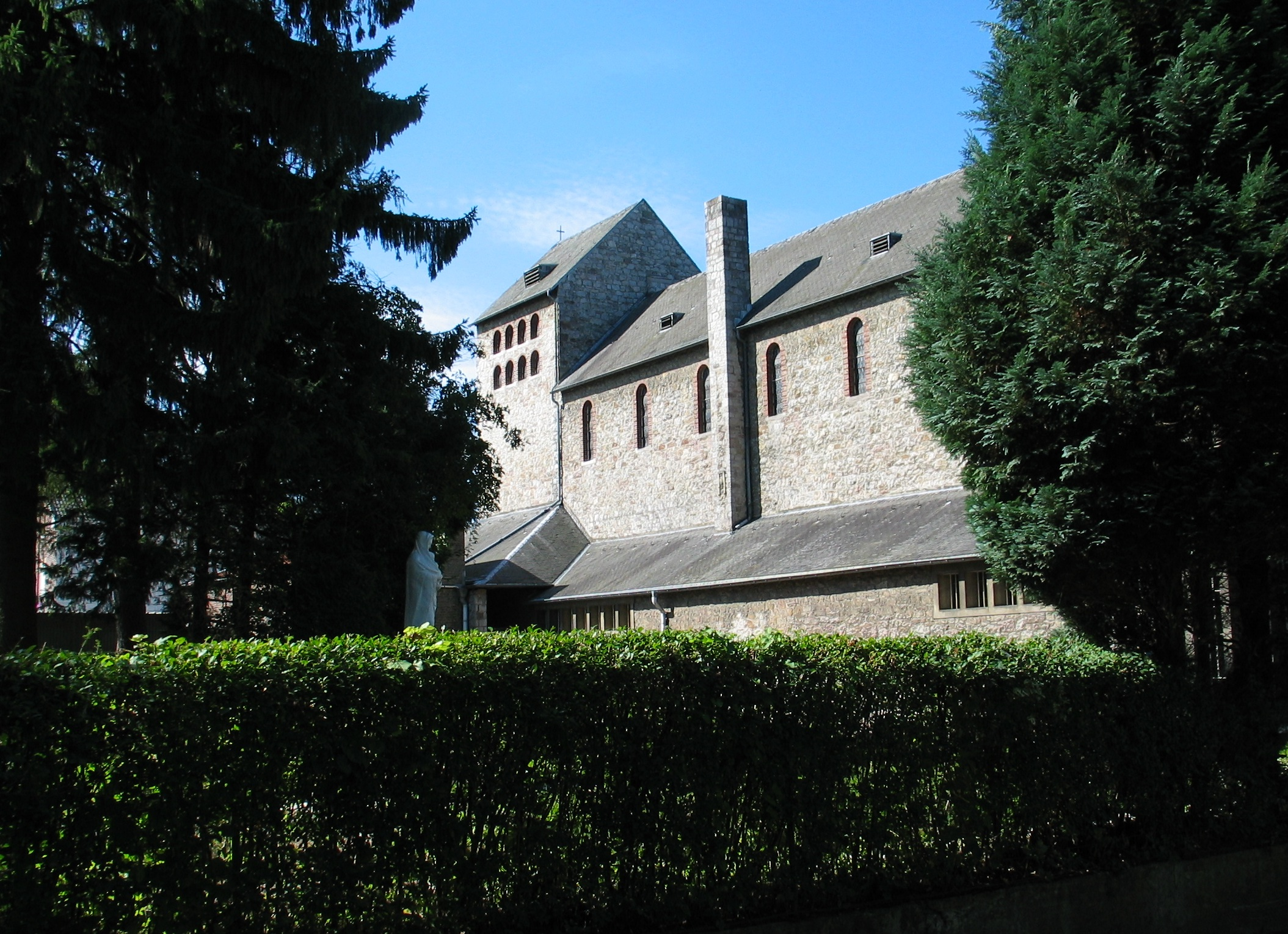 Kloster Garnstock, Eupen-Baelen, Kirchenbau von Dominikus Böhm, Grundsteinlegung 1935